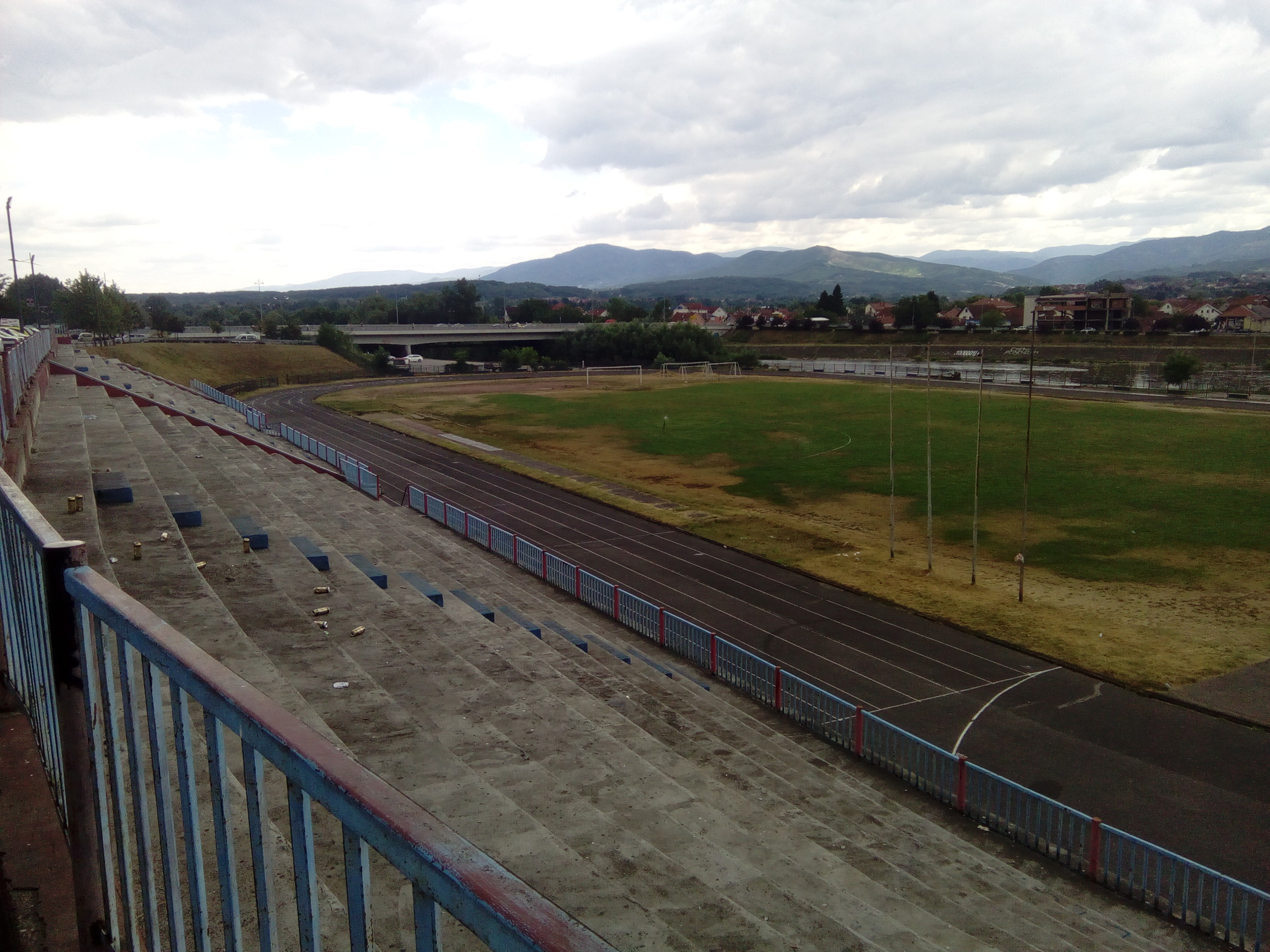 Atletski stadion u Kraljevu